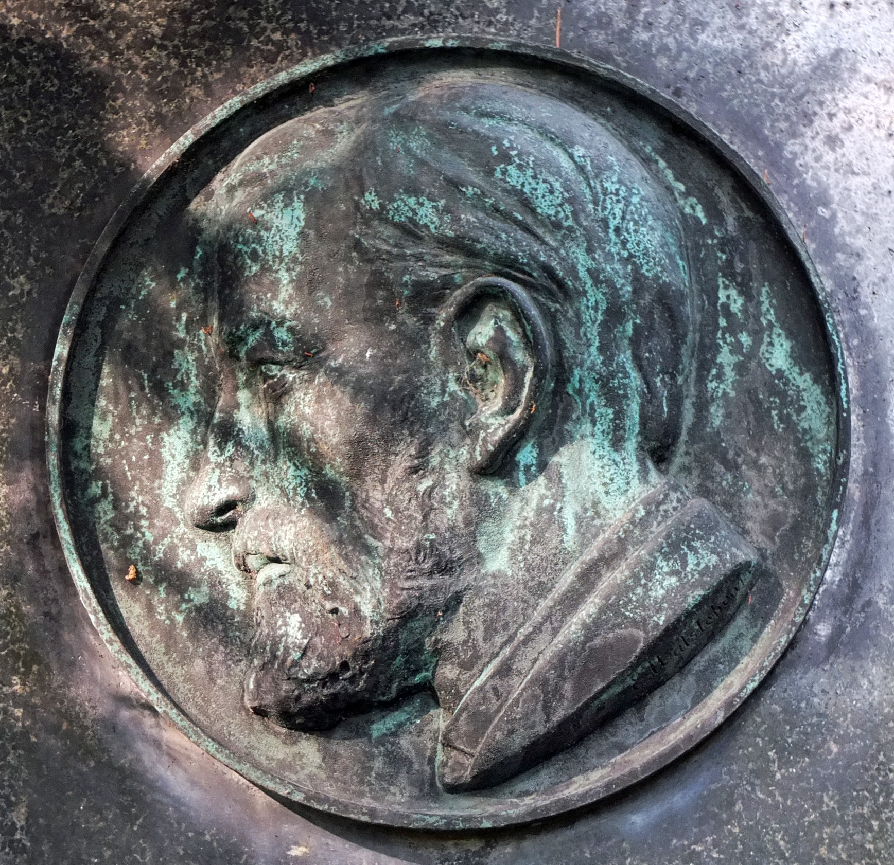 Relieftondo das Martin Anton Niendorf an dessen Grab auf dem Friedrichswerderschen Friedhof II in Berlin-Kreuzberg zeigt. Unter dem Halsansatz hat der Bildhauer Emil Walsleben das Tondo mit "E. Walsleben fec." signiert.